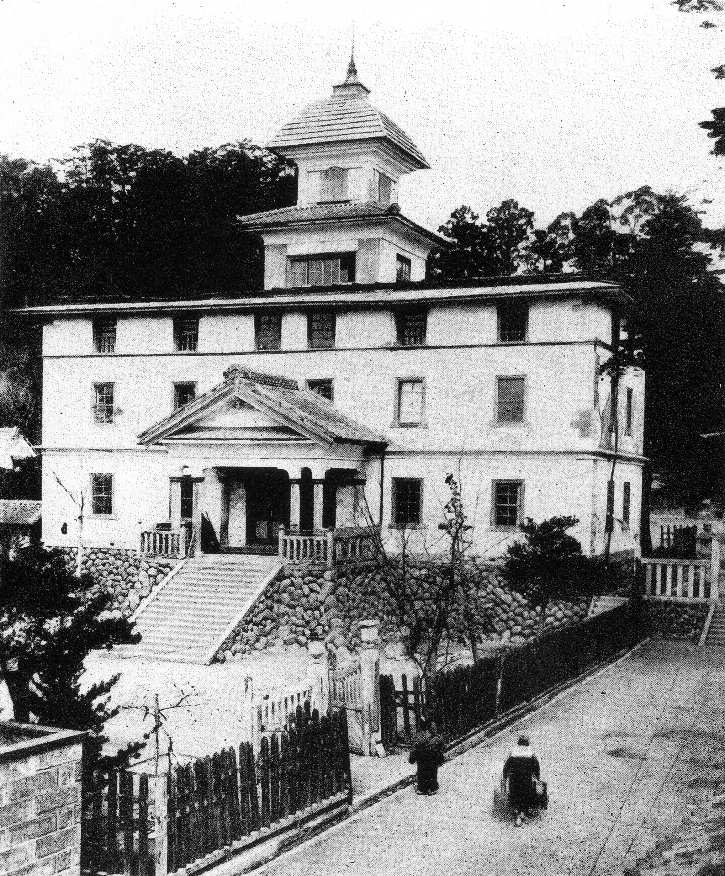 1875年に静岡県磐田市に建てられた見付学校。写真は1921年頃のもので、3階が増築されている。